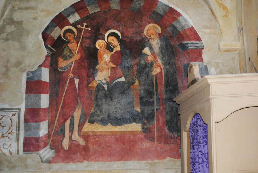 Santuario santa maria di acqua dolce - Interni